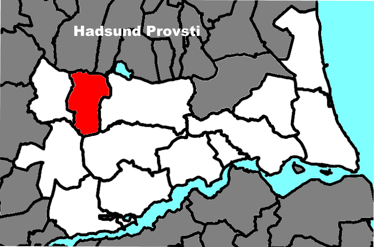 Sognets beliggenhed i Hadsund Provsti.